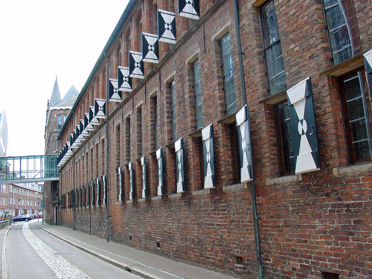 Provinciehuis Groningen (achterzijde)